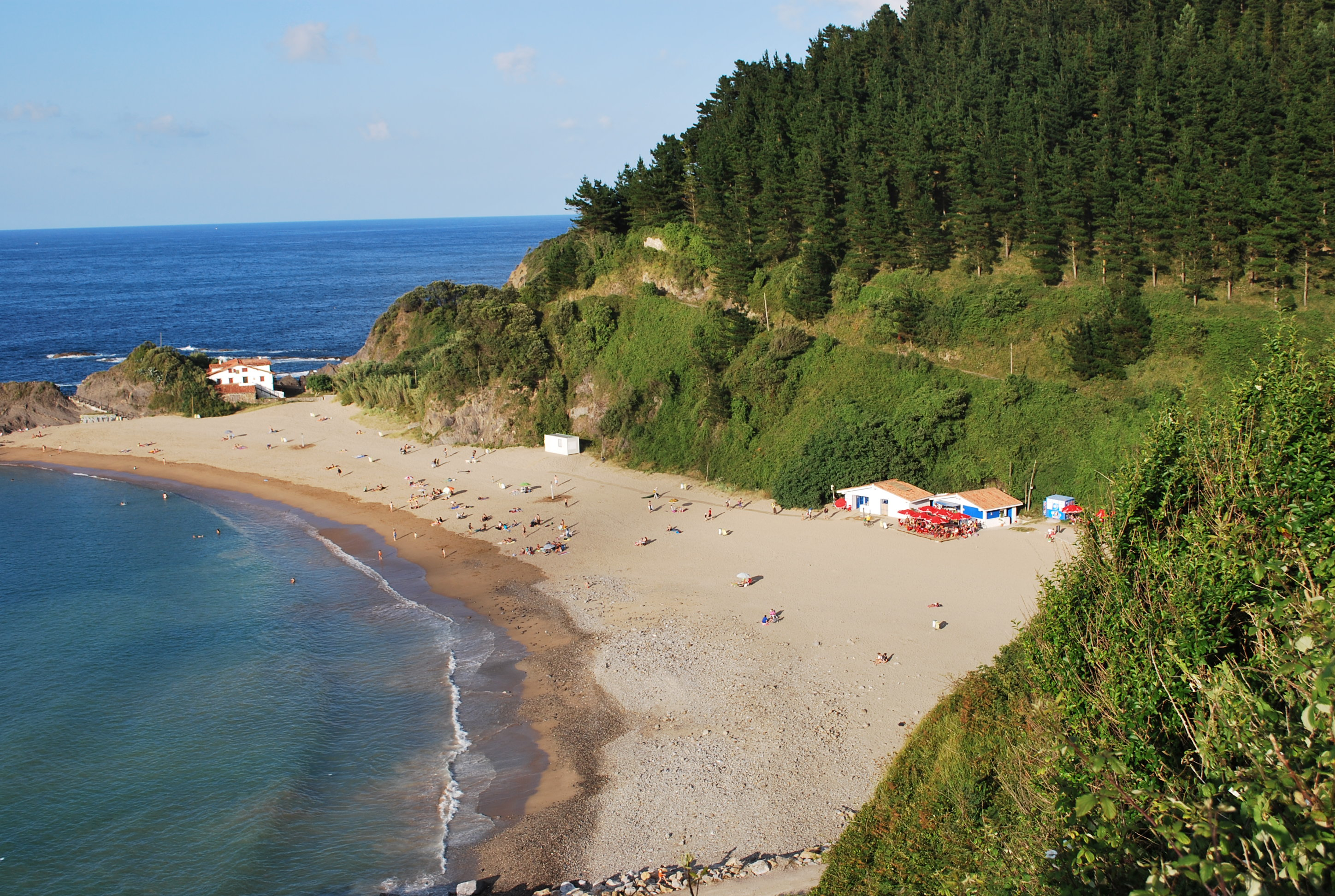 Plage de Saturraran partagée entre les communes d'Ondarroa et Mutriku (Biscaye).